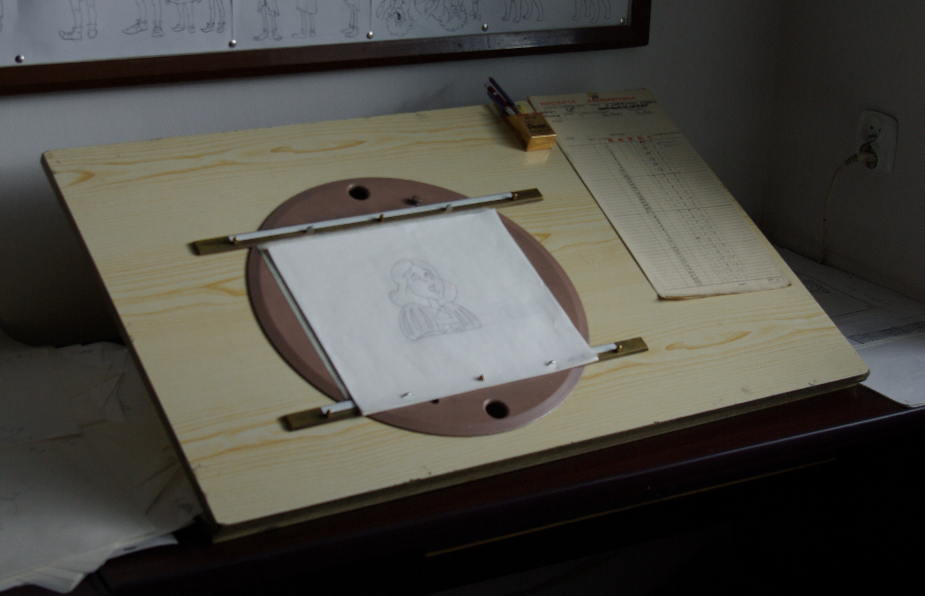 Studio Filmów Rysunkowych w Bielsku-Białej